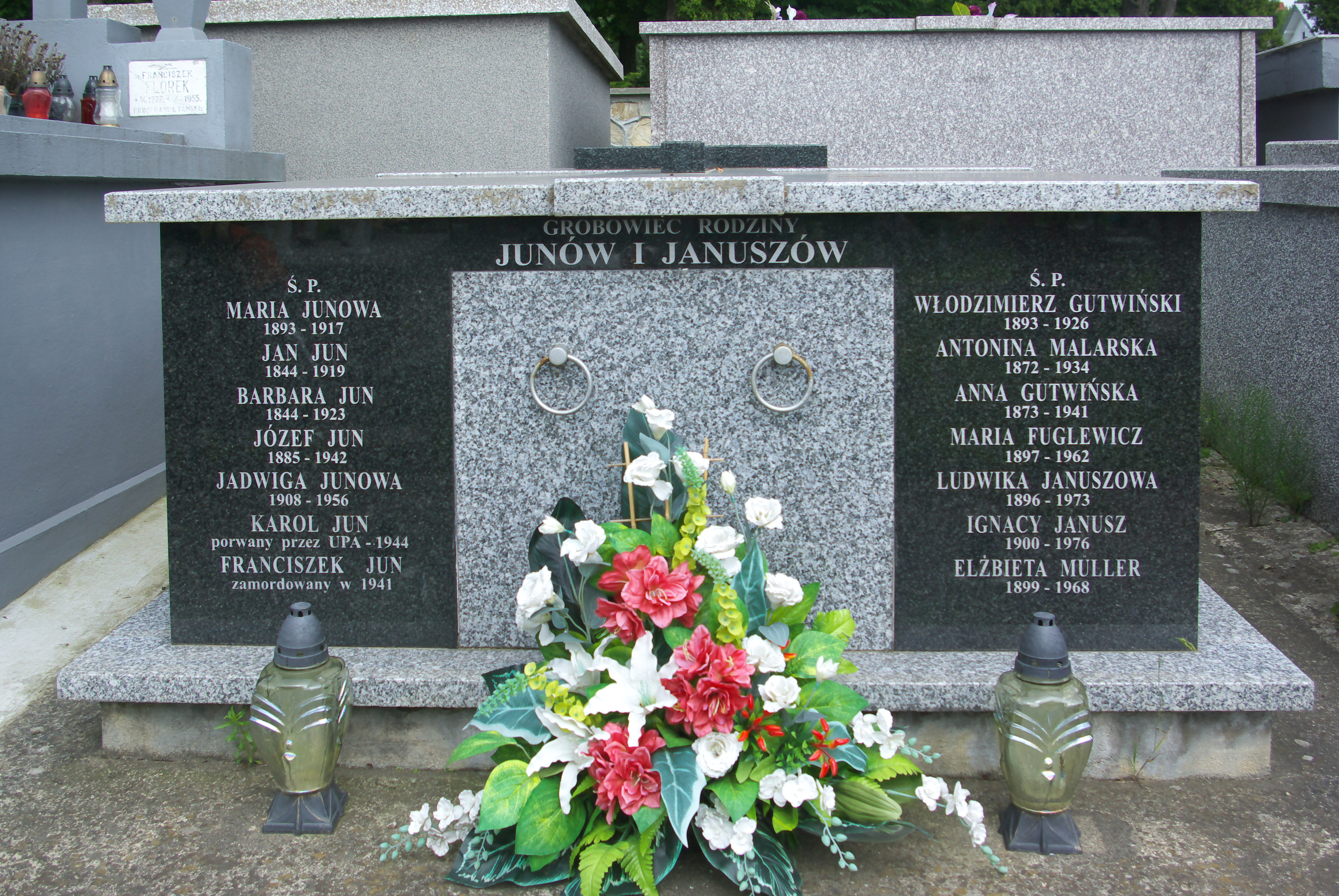 Grobowiec rodzin Junów i Januszów na Cmentarzu Centralnym w Sanoku (2020).